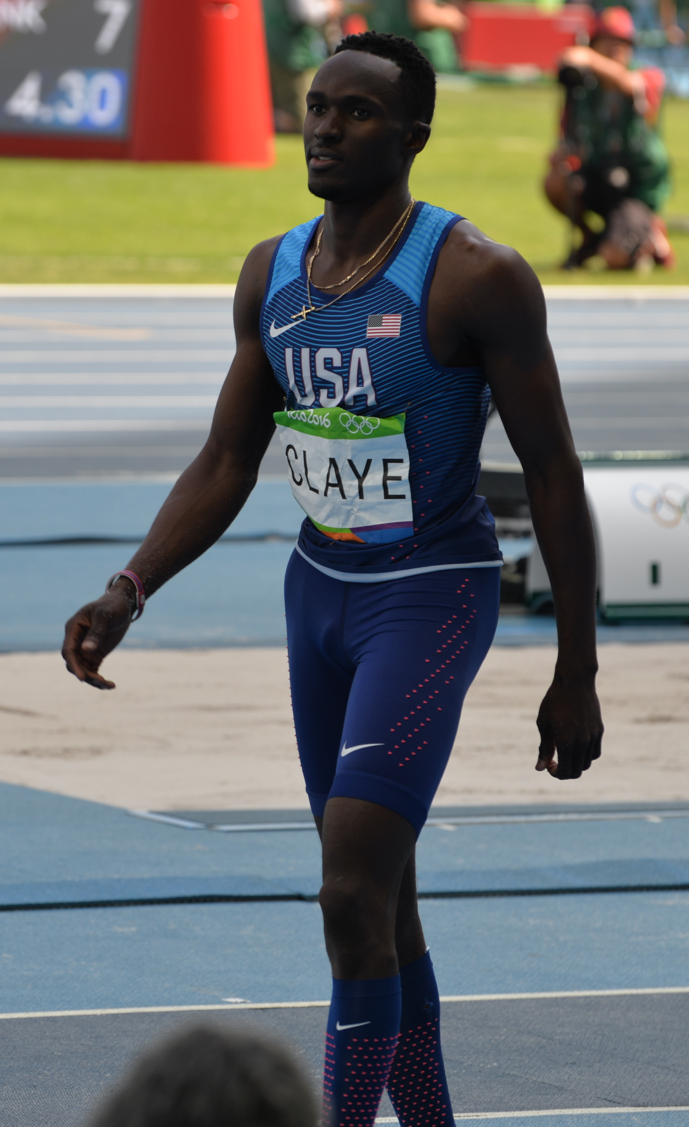 Finale du concours du triple saut à Rio 2016